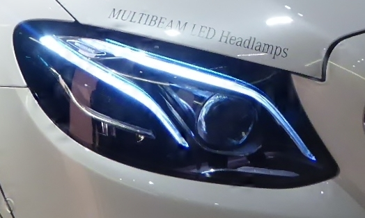 S213系メルセデス・ベンツ・E250ステーションワゴンアヴァンギャルドSports本革シート仕様をフロントから撮影。